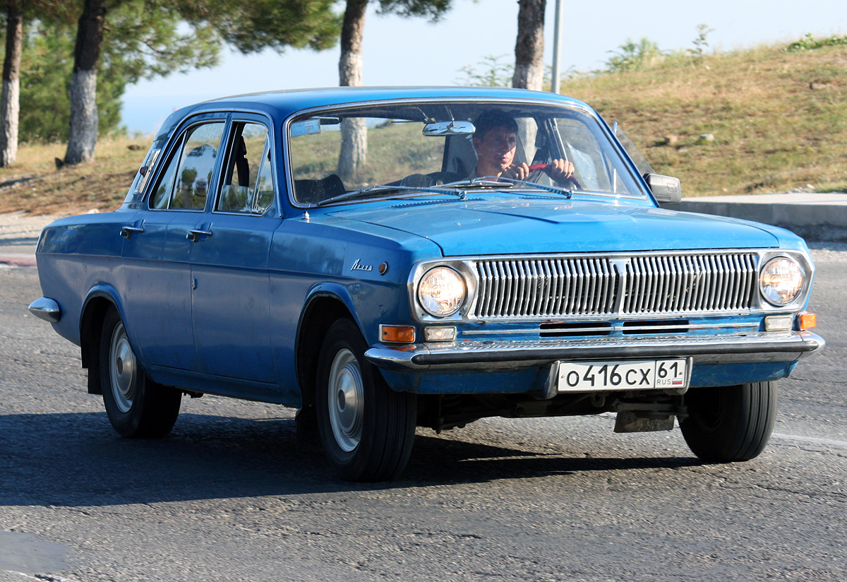 GAZ-24